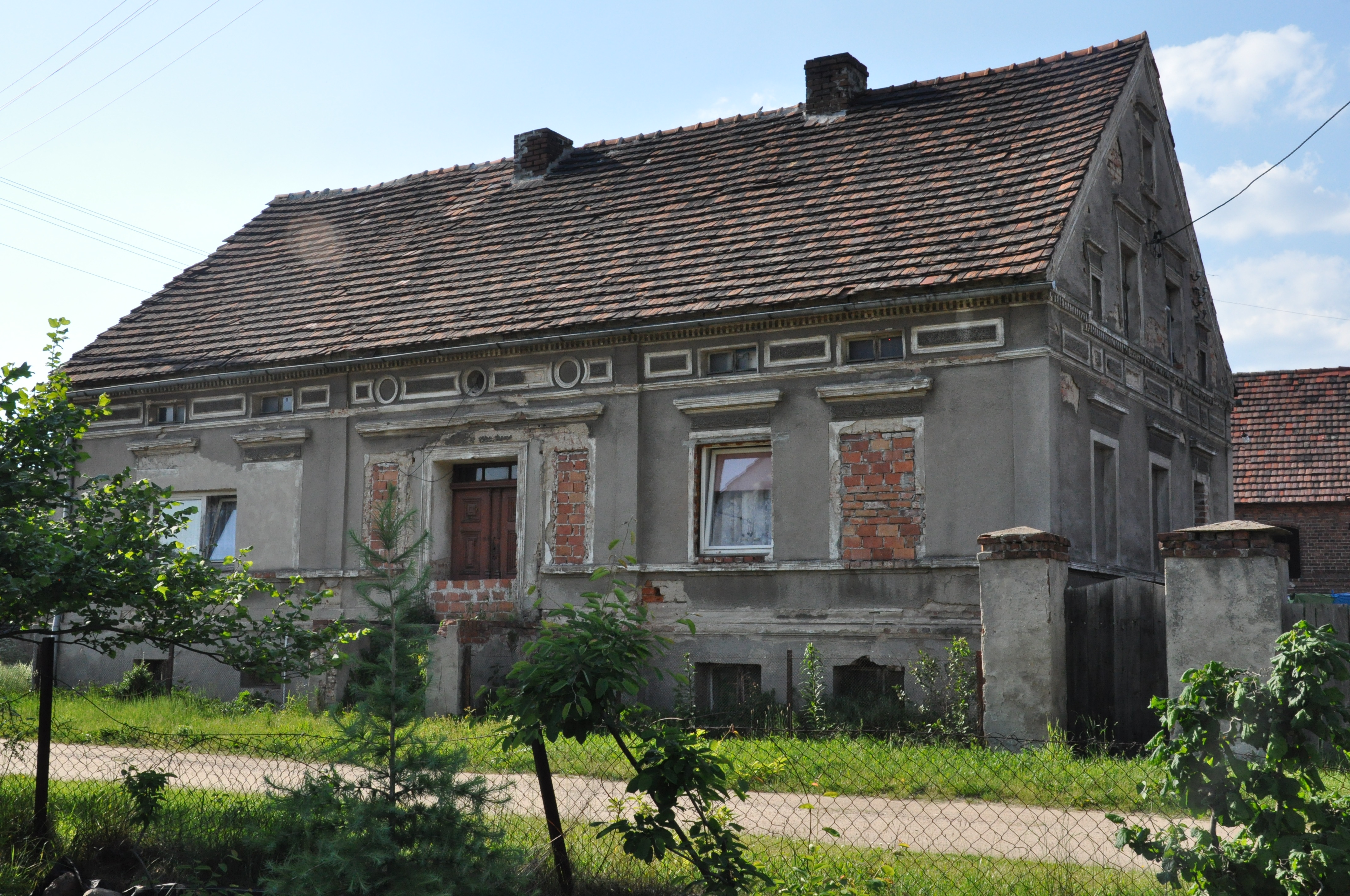 Strażnica WOP w Późnie.